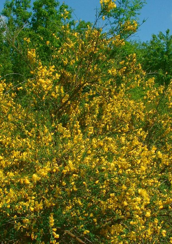 Genêt à balais, photo J.F. Gaffard, environs de Gray, mai 2004